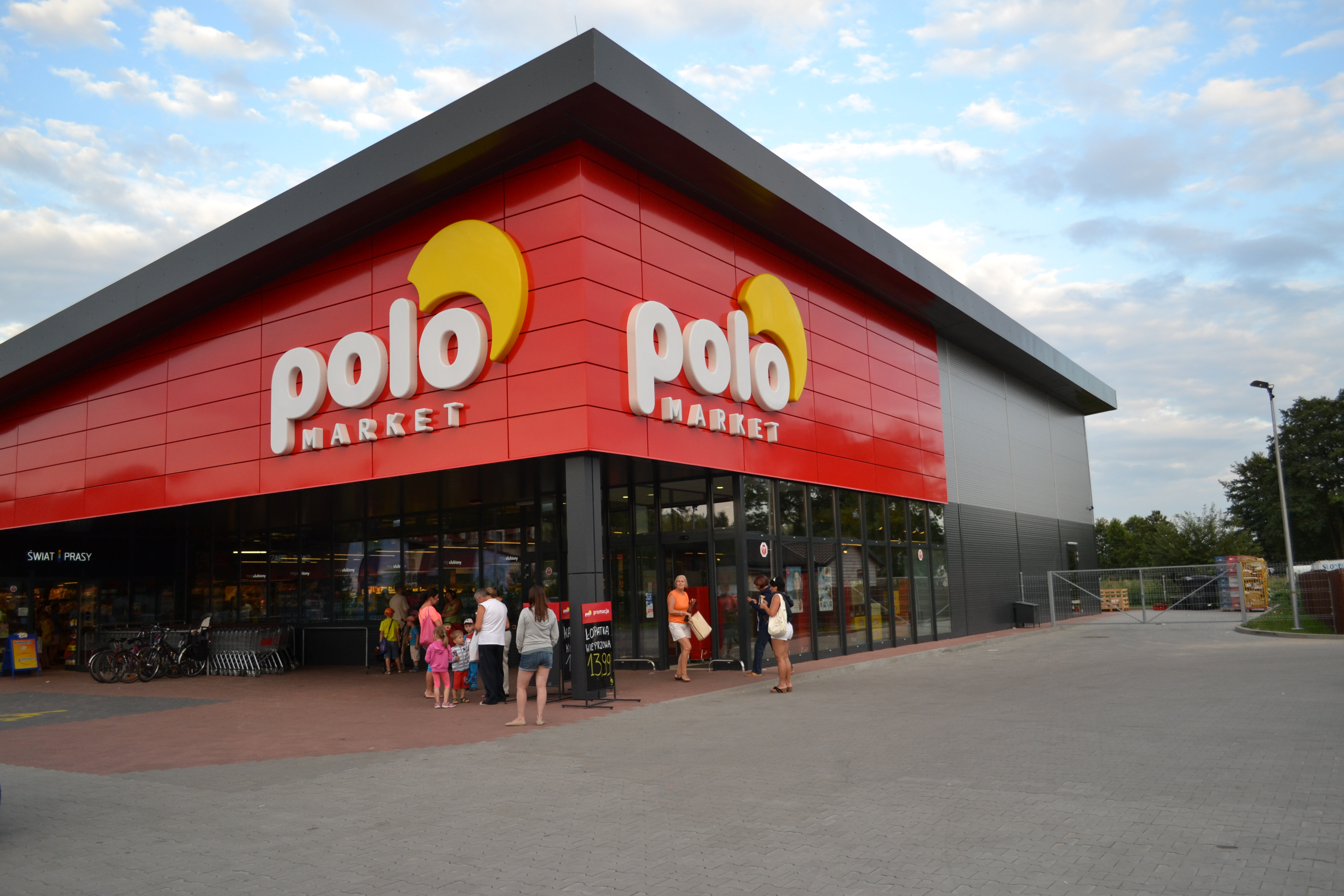 POLOmarket widok obiektu